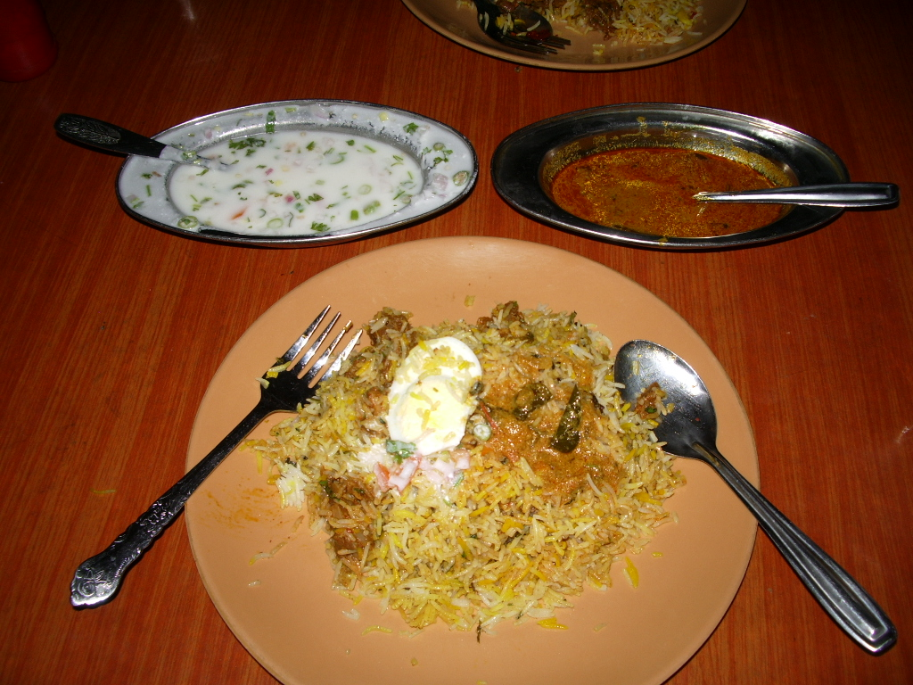 ビリアーニ